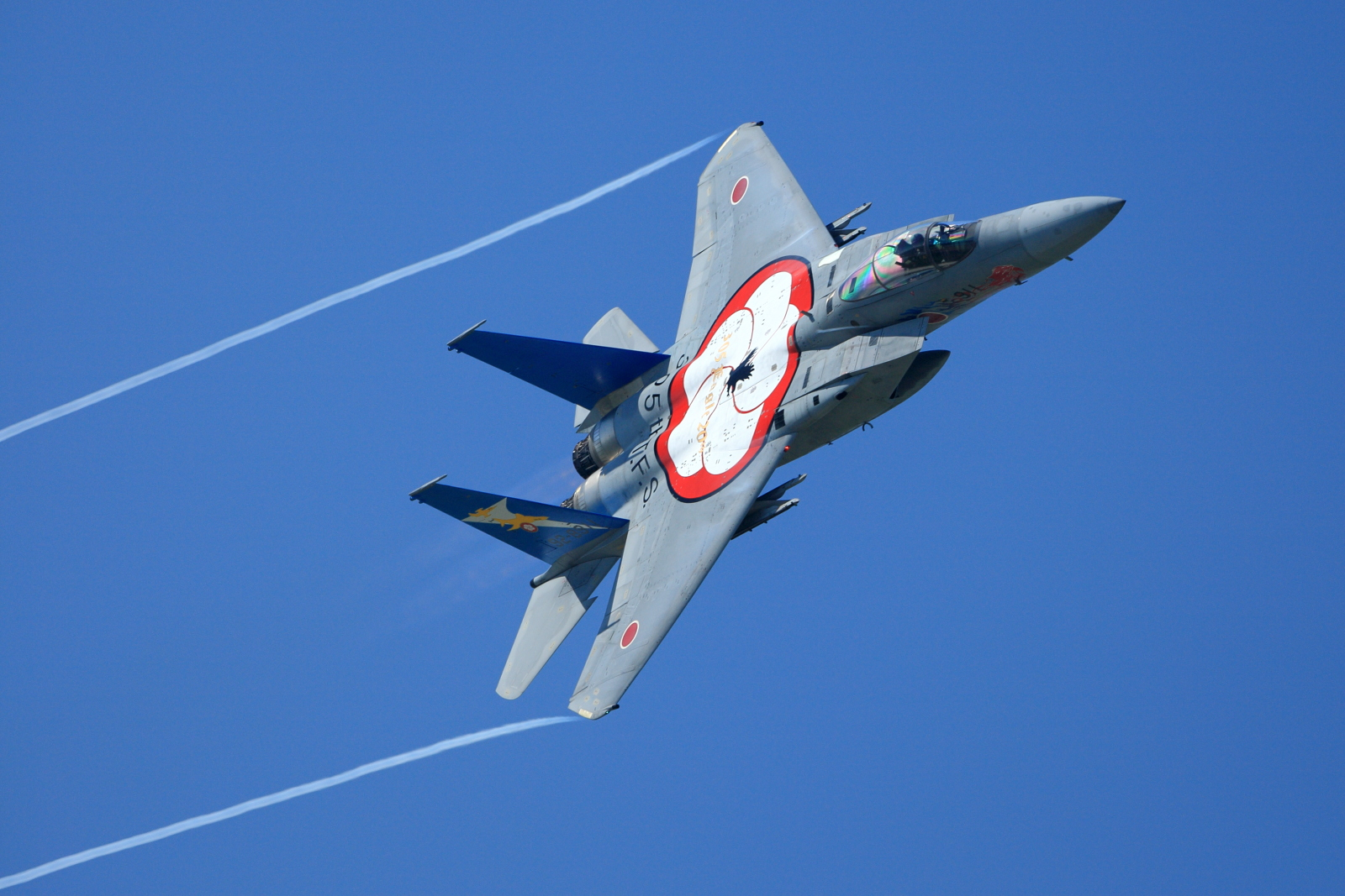 航空自衛隊百里基地 第305飛行隊の、F-15J 第305飛行隊F-15運用20周年記念塗装機